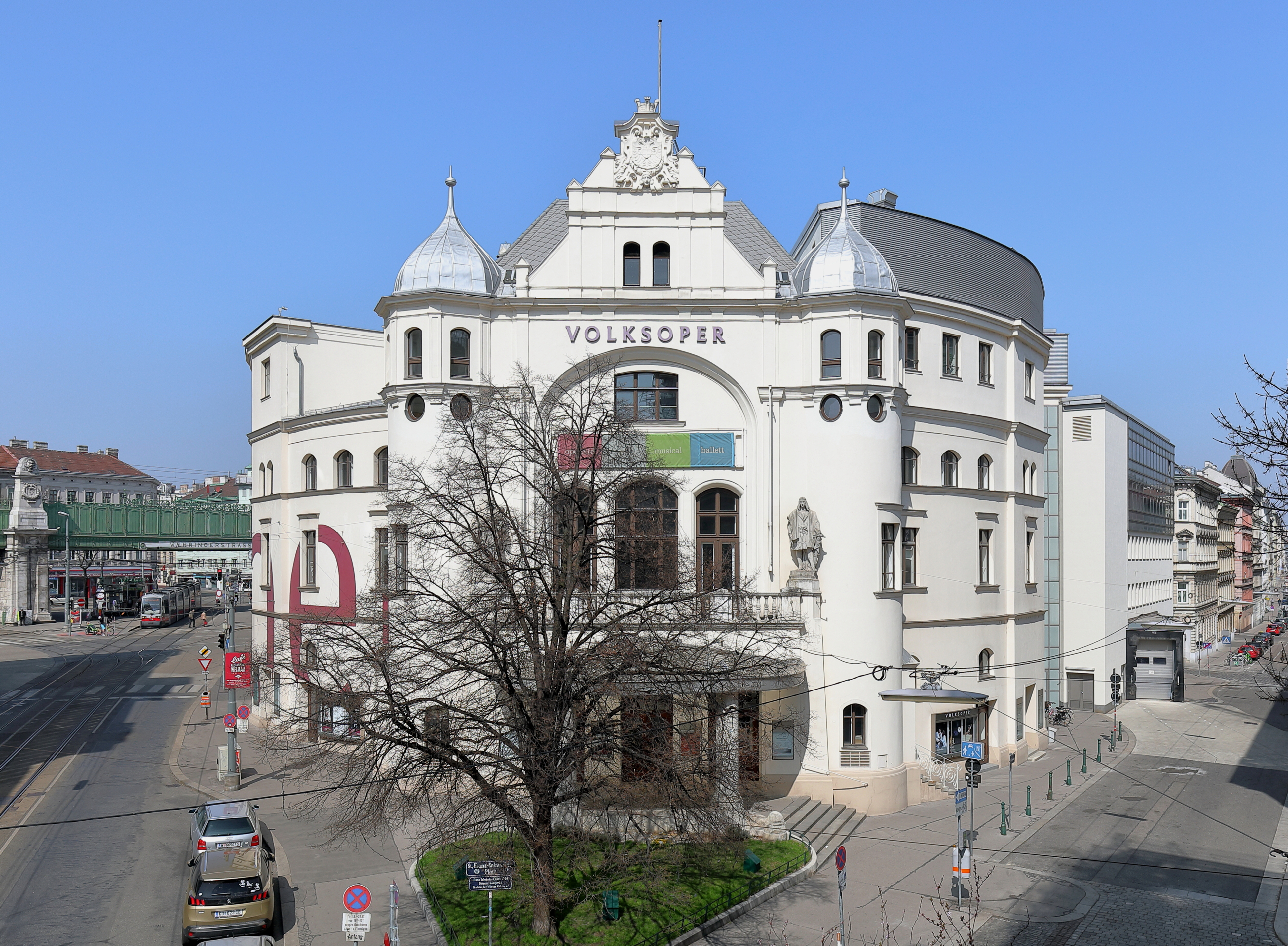 Die Volksoper in der österreichischen Bundeshauptstadt Wien. Anlässlich des 50-jährigen Regierungsjubiläums von Kaiser Franz Joseph I. wurde sie unter dem Namen "Kaiser-Jubiläums-Stadttheater" durch die Architekten Franz Freiherr von Krauss und Alexander Graf errichtet und am 14. Dezember 1898 als Sprechbühne eröffnet. Ab 1908 firmierte das Theater nur mehr unter dem Namen "Volksoper".